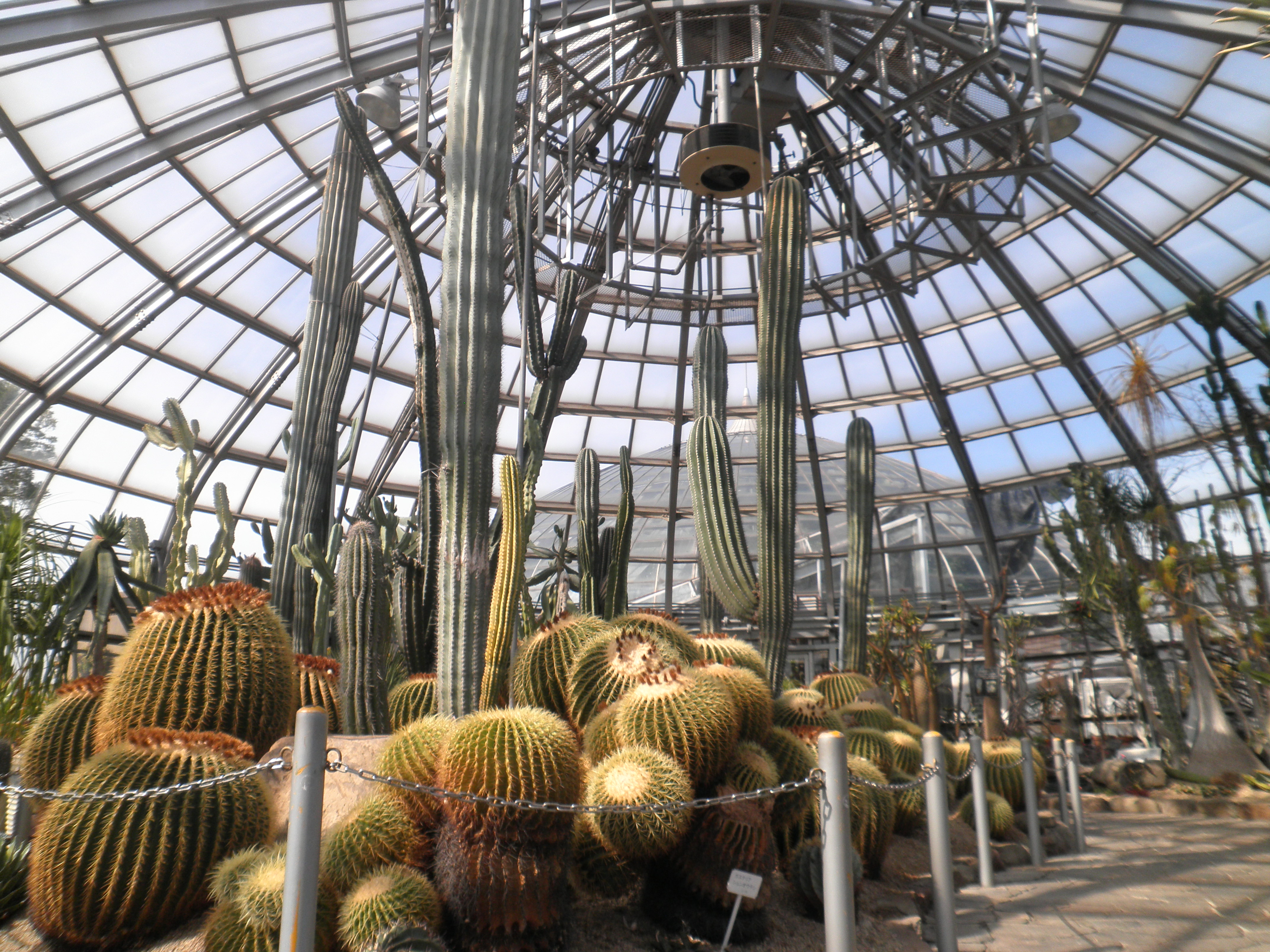 姫路市立手柄山温室植物園の温室